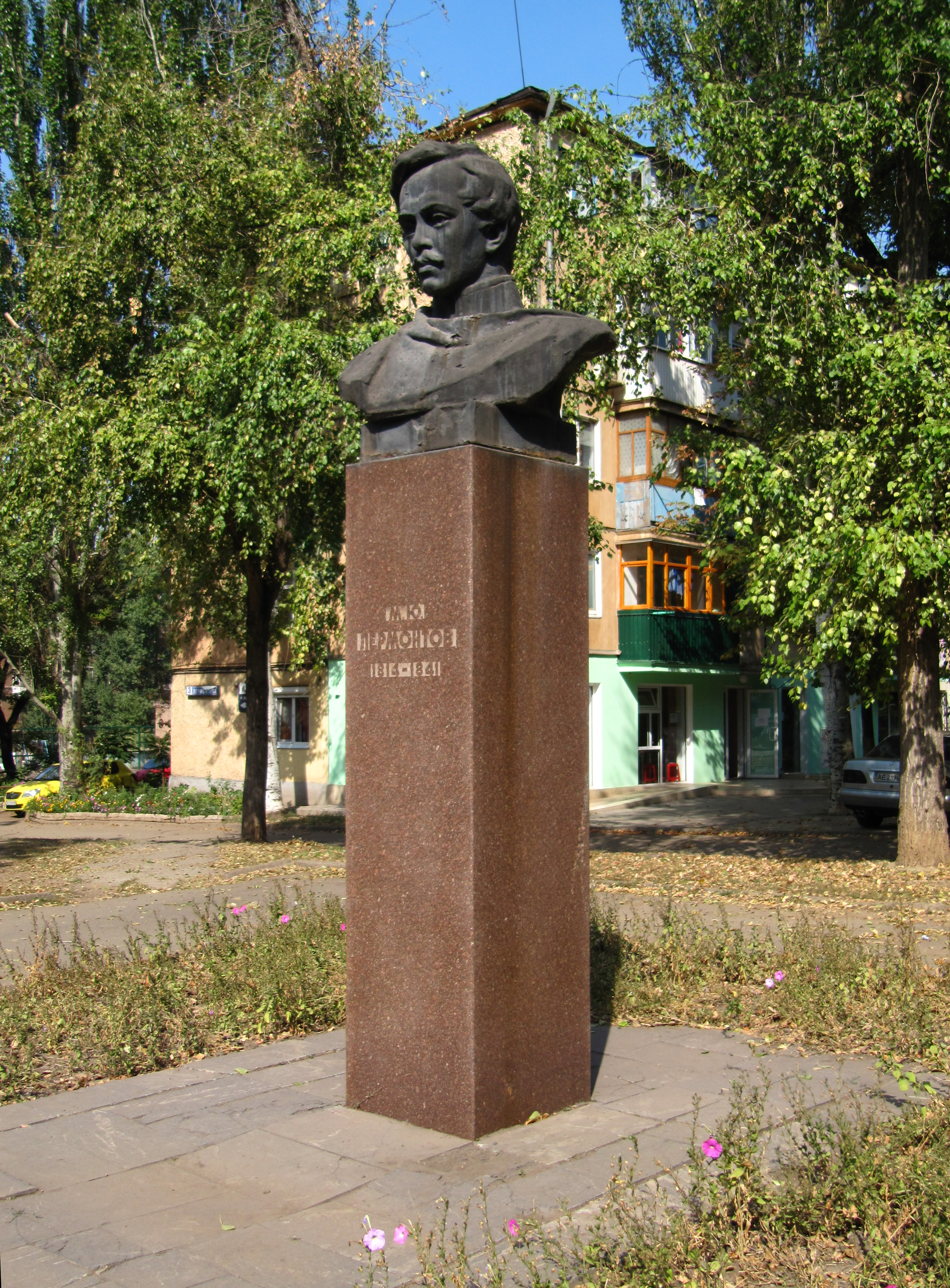 Погруддя М.Ю.Лермонтова, Кривий Ріг, вул. Лермонтова, 9